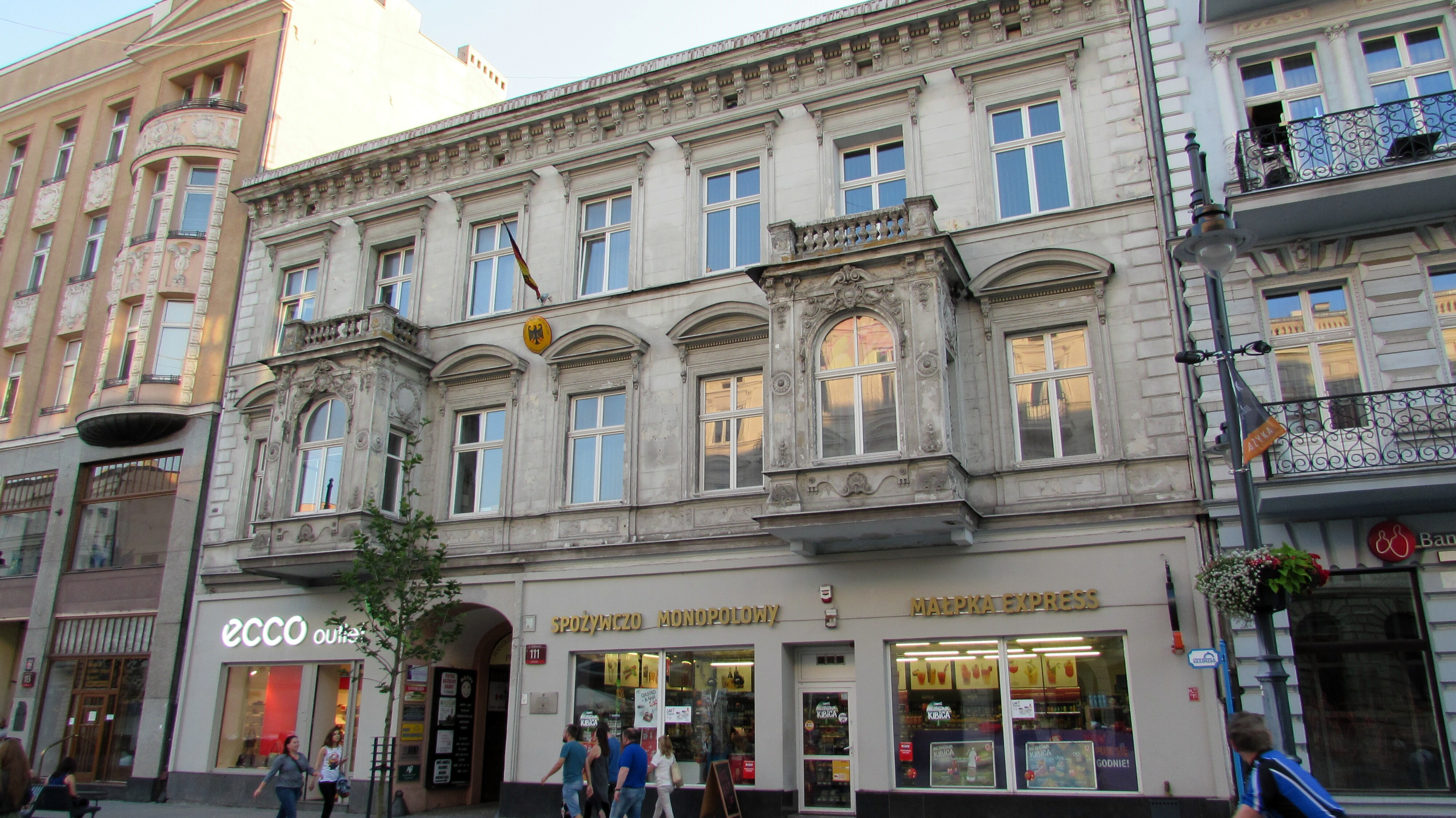 Lodz Deutsches Konsulat